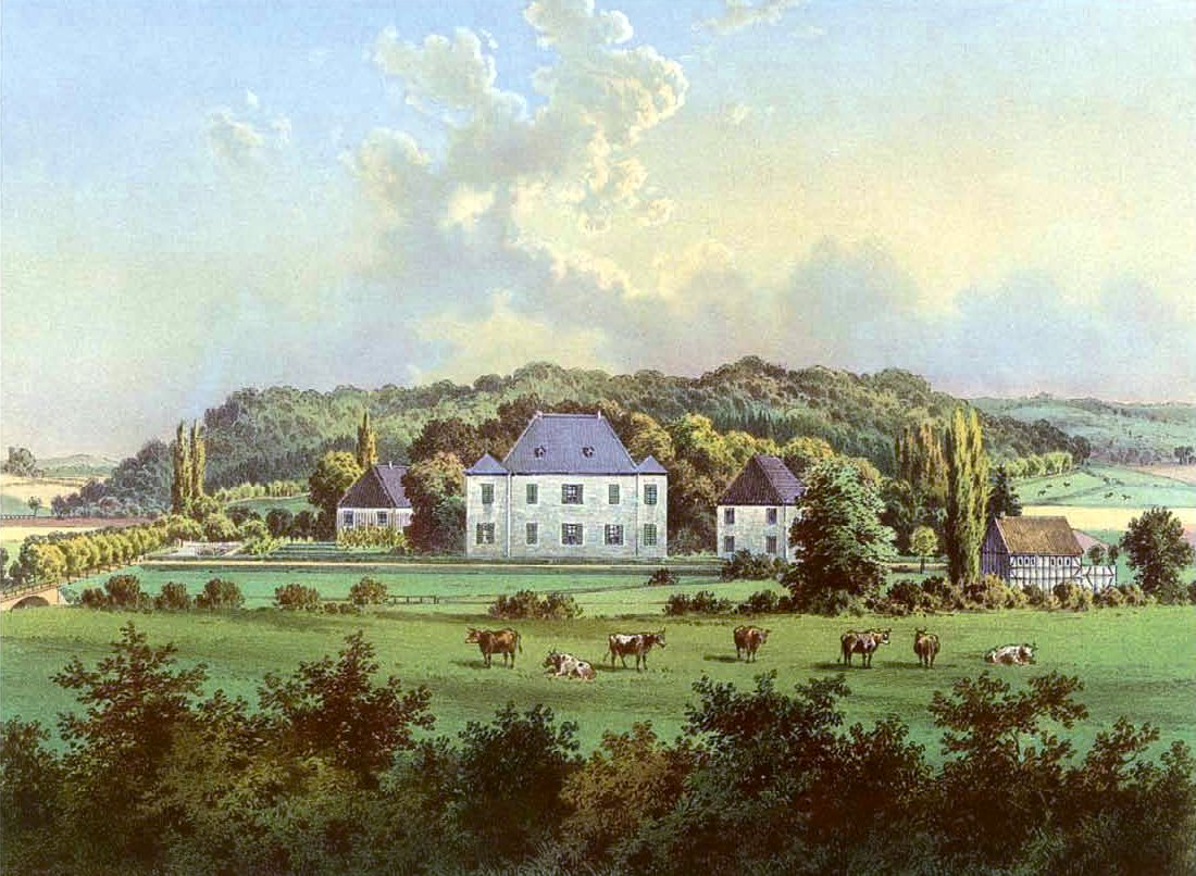 Rittergut Rocholz